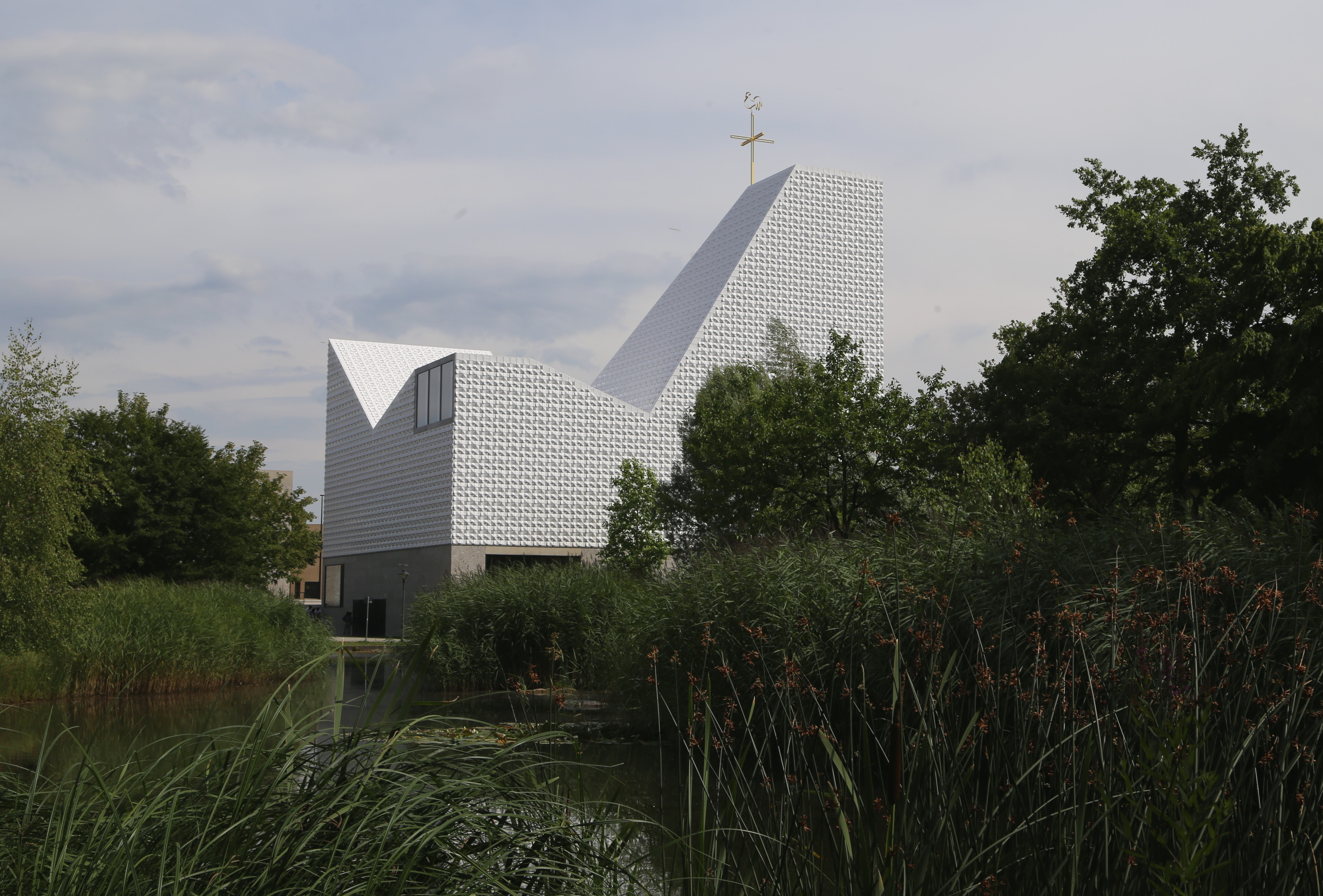 Pfarrkirche Seliger Pater Rupert Mayer, Poing; Architekt: Andreas Meck